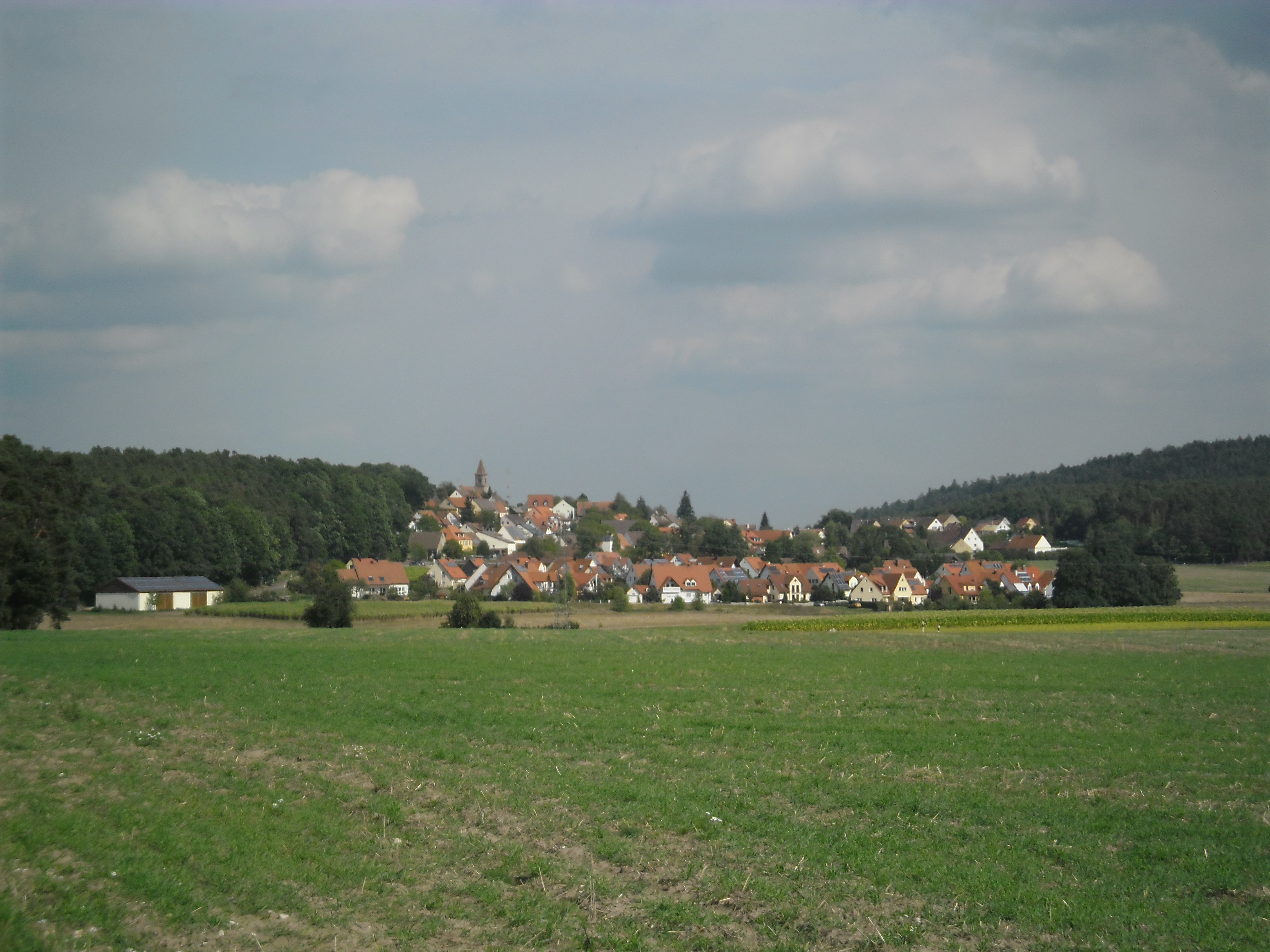 Kammerstein von Südwest (Radweg B466) 01